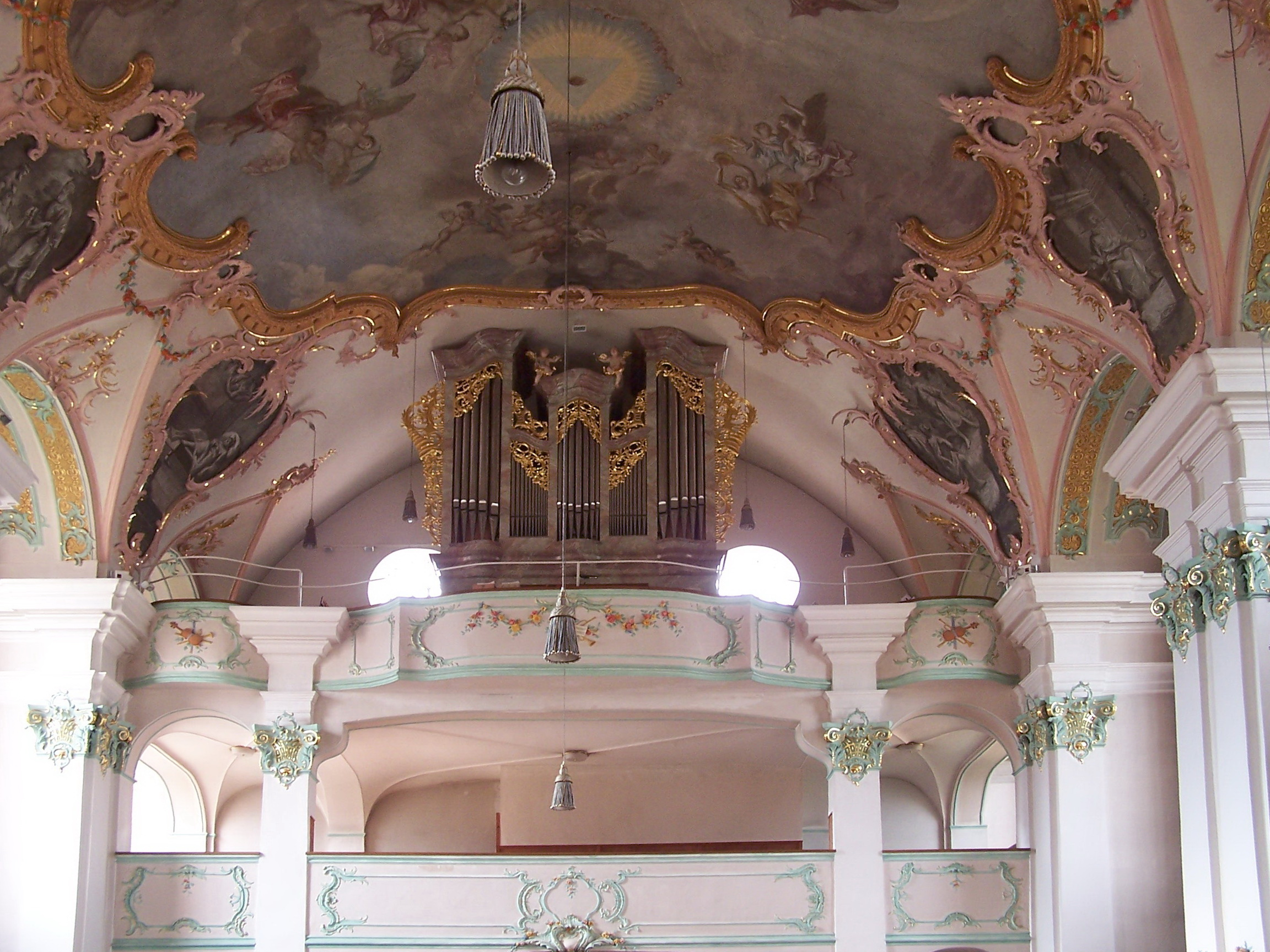 Geiselhöring, Schlossgraben 17. Katholische Stadtpfarrkirche St. Petrus und Erasmus. Barockes Langhaus, 1761-64 von Georg Fischer, Chor und Turmuntergeschosse mittelalterlich, Obergeschoss 1776; mit Ausstattung. Doppelstöckige Westemporen; auf der oberen Empore Rieger Orgel auf dem Jahr 1998.